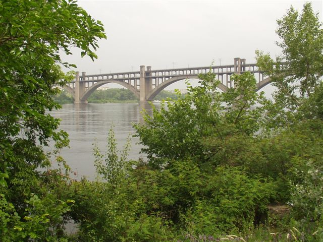 Die Brücke in Saporoshje zwischen der Stadt und der Insel Chortiza.